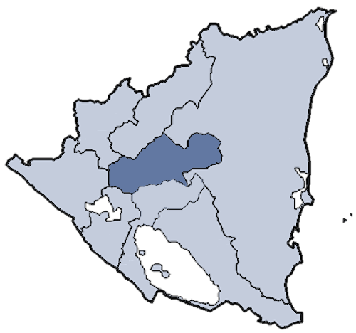 Mappa della diocesi cattolica di Matagalpa, in Nicaragua. Lavoro personale eseguito a partire da questa immagine di Commons. Fonte per i confini delle diocesi: Categoria:Chiesa cattolica in Nicaragua